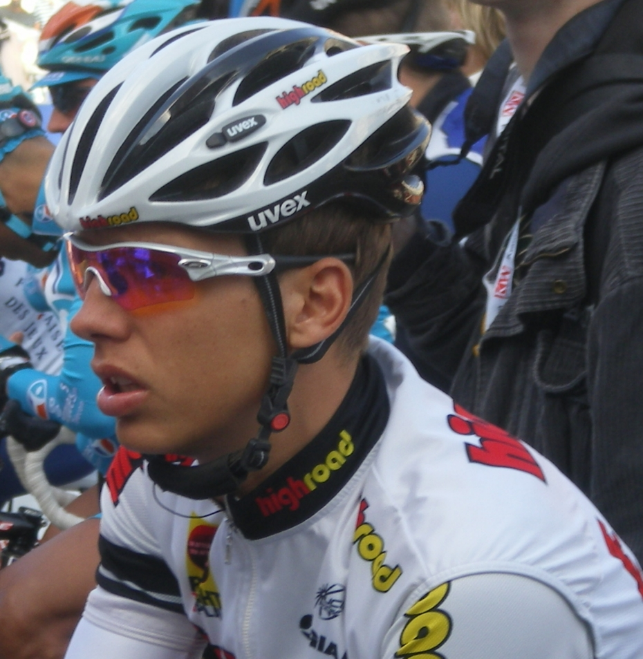 Tony Martin (Driedaagse van West Vlaanderen 2008)